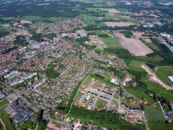 Steinhagen mittels Flugroboter fotografiert